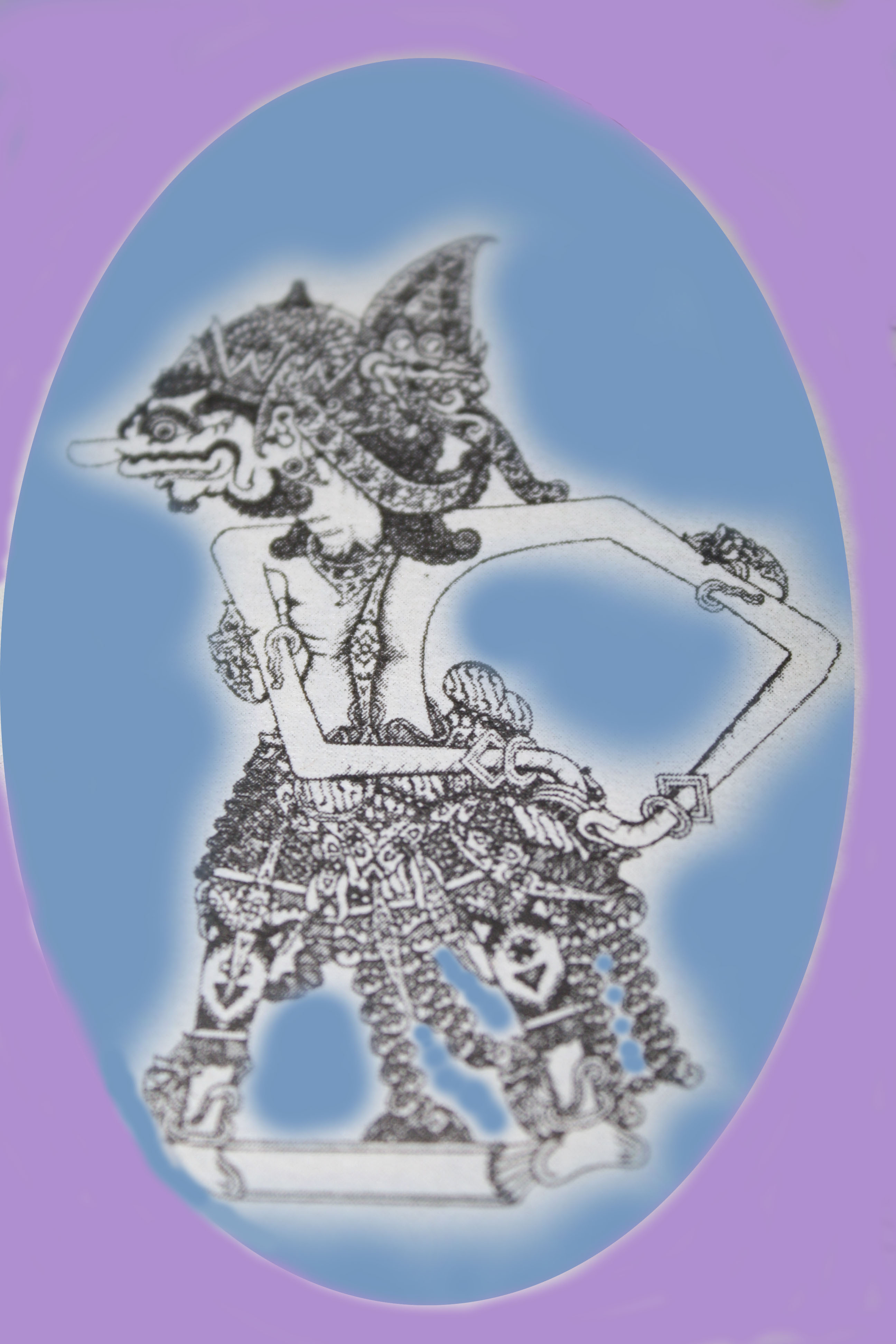 Dursasana adalah satu dari paraga pewayangan dan kumpulan dari seratus kurawa